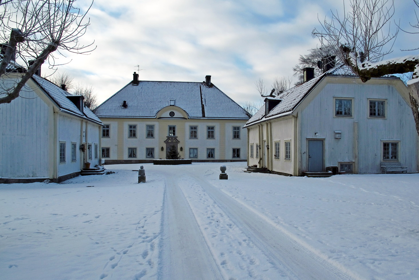 Herresta herrgård 2016